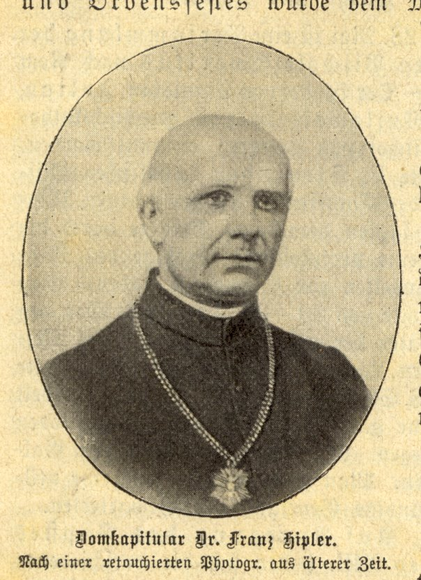 Domkapitular Franz Hipler.